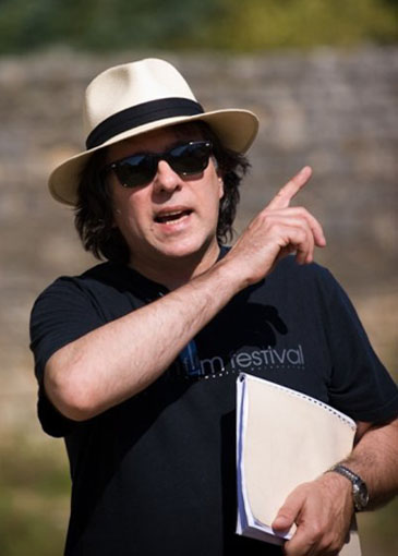 sur le tournage de "L'Orpheline avec en plus un bras en moins" (2009)